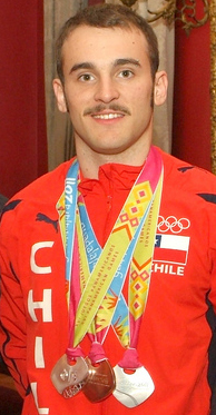 Tomás González, gimnasta chileno, con sus medallas ganadas en los XVI Juegos Panamericanos.